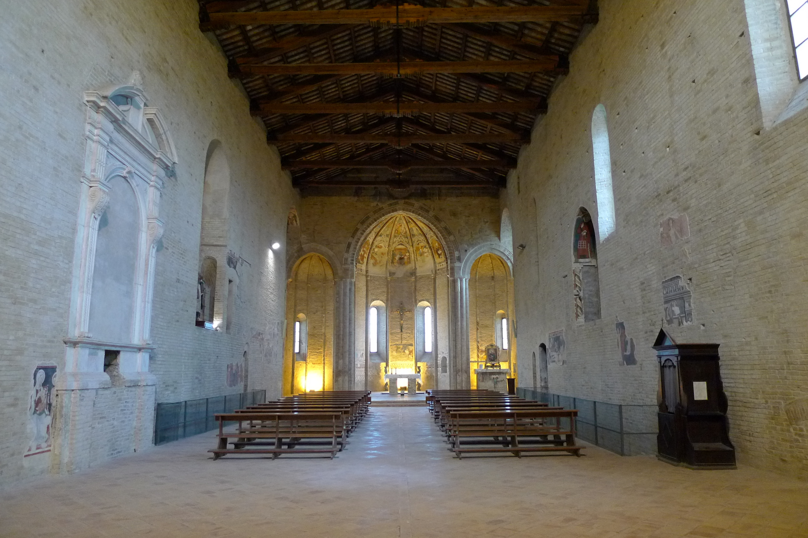 Offida, Chiesa di Santa Maria della Rocca, inside